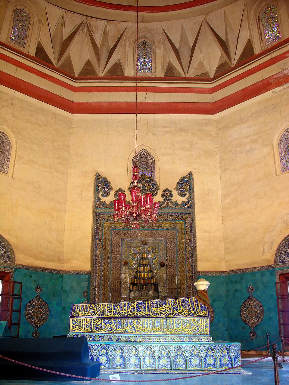 Turkey-1363